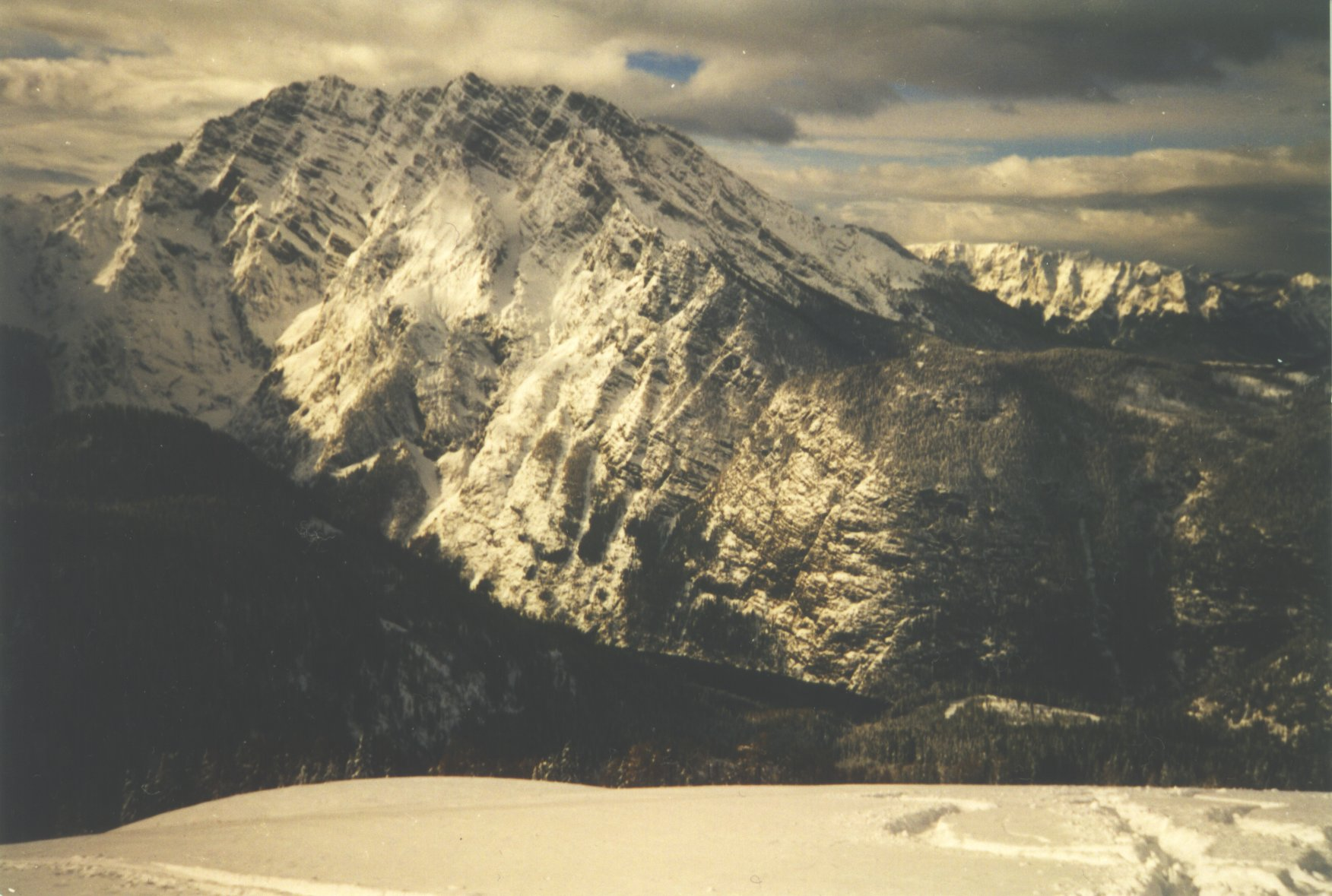 Watzmann von den Hohen Roßfeldern aus